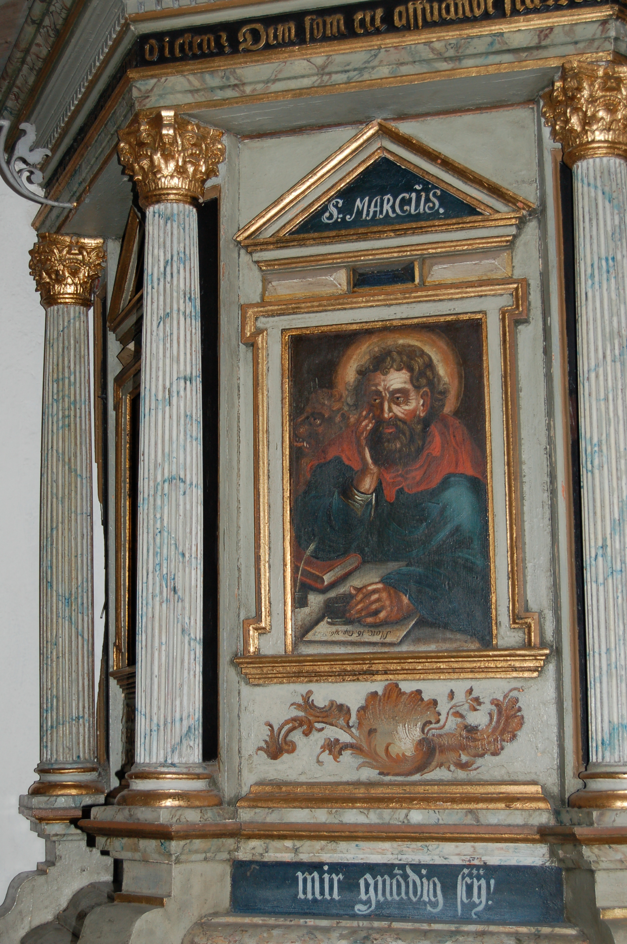 Evangelisten Markus i Tjølling kirke ANNO 1598